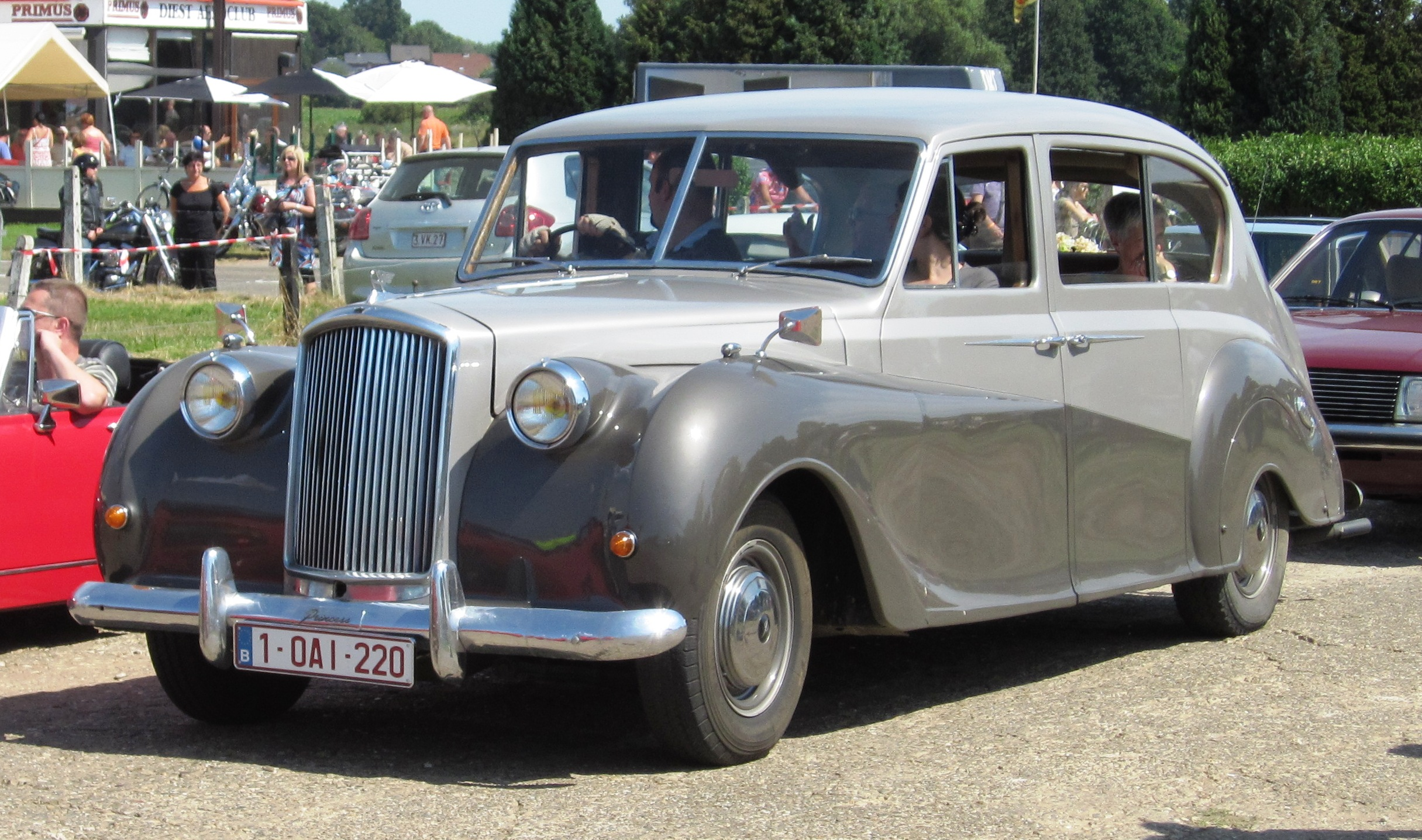 Vanden Plas Princess Limousine d'annees 60.